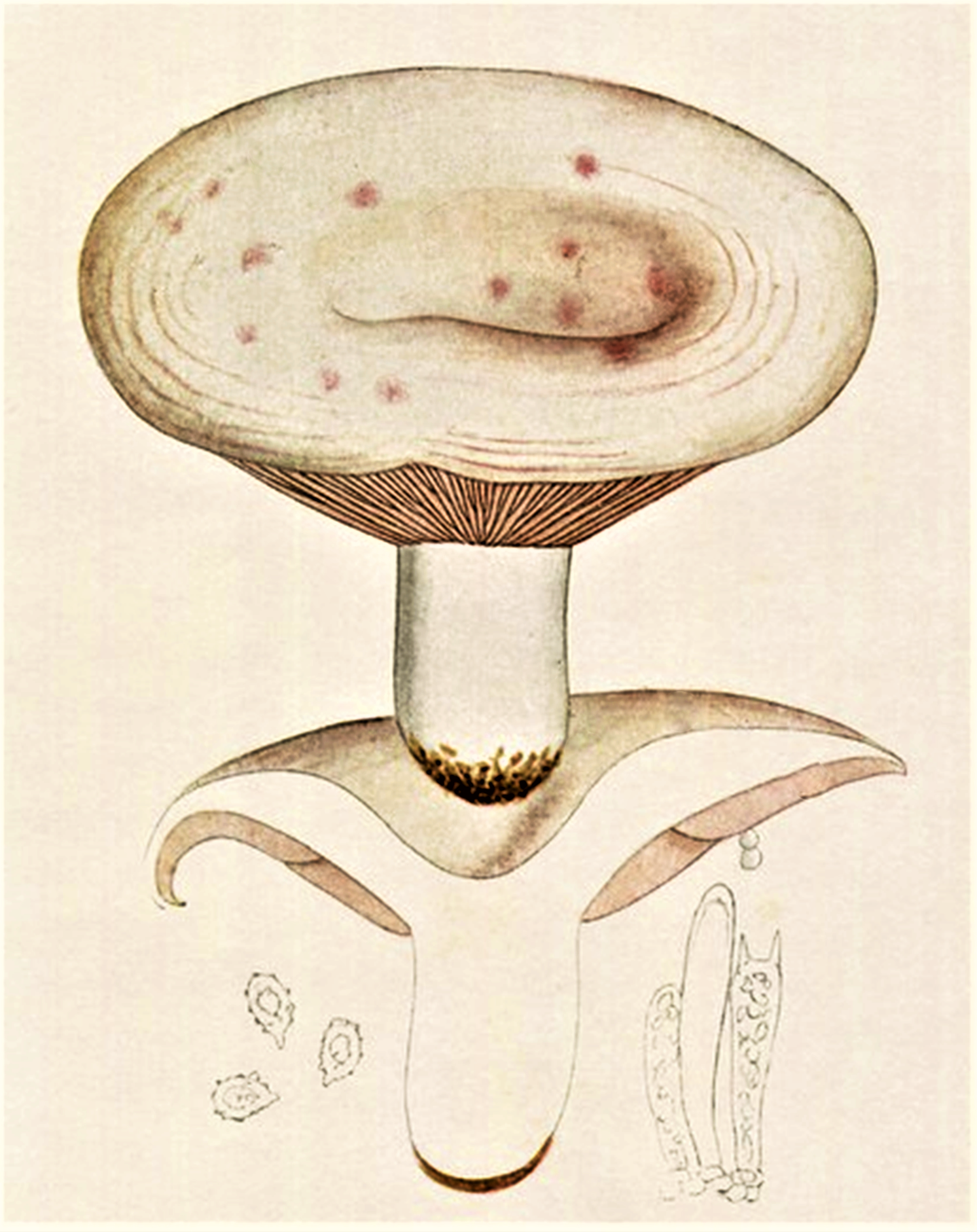 Bres.: Lactarius controversus Pers. (1800)